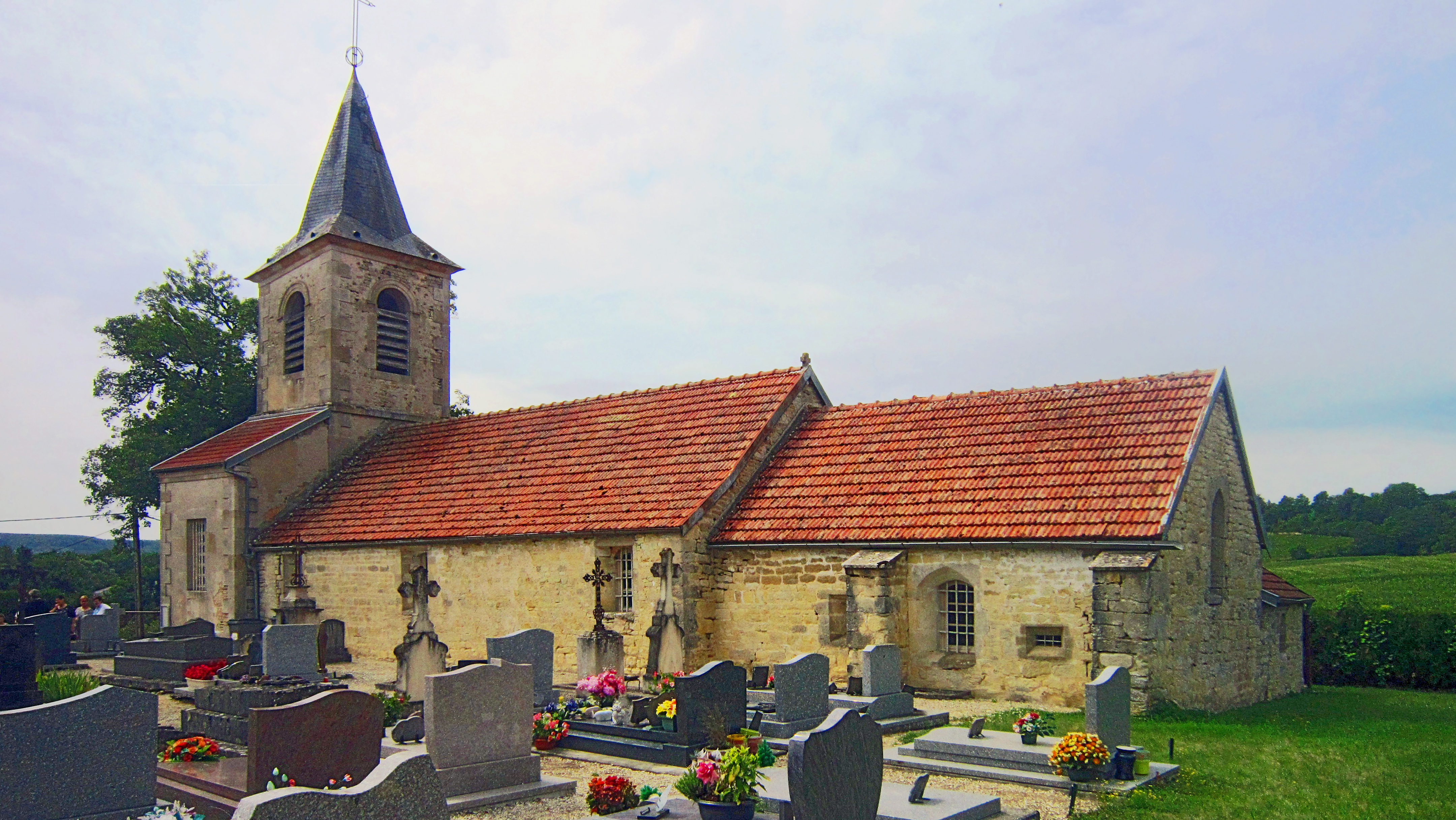 Façade sud de l'église de Villers-Patras.